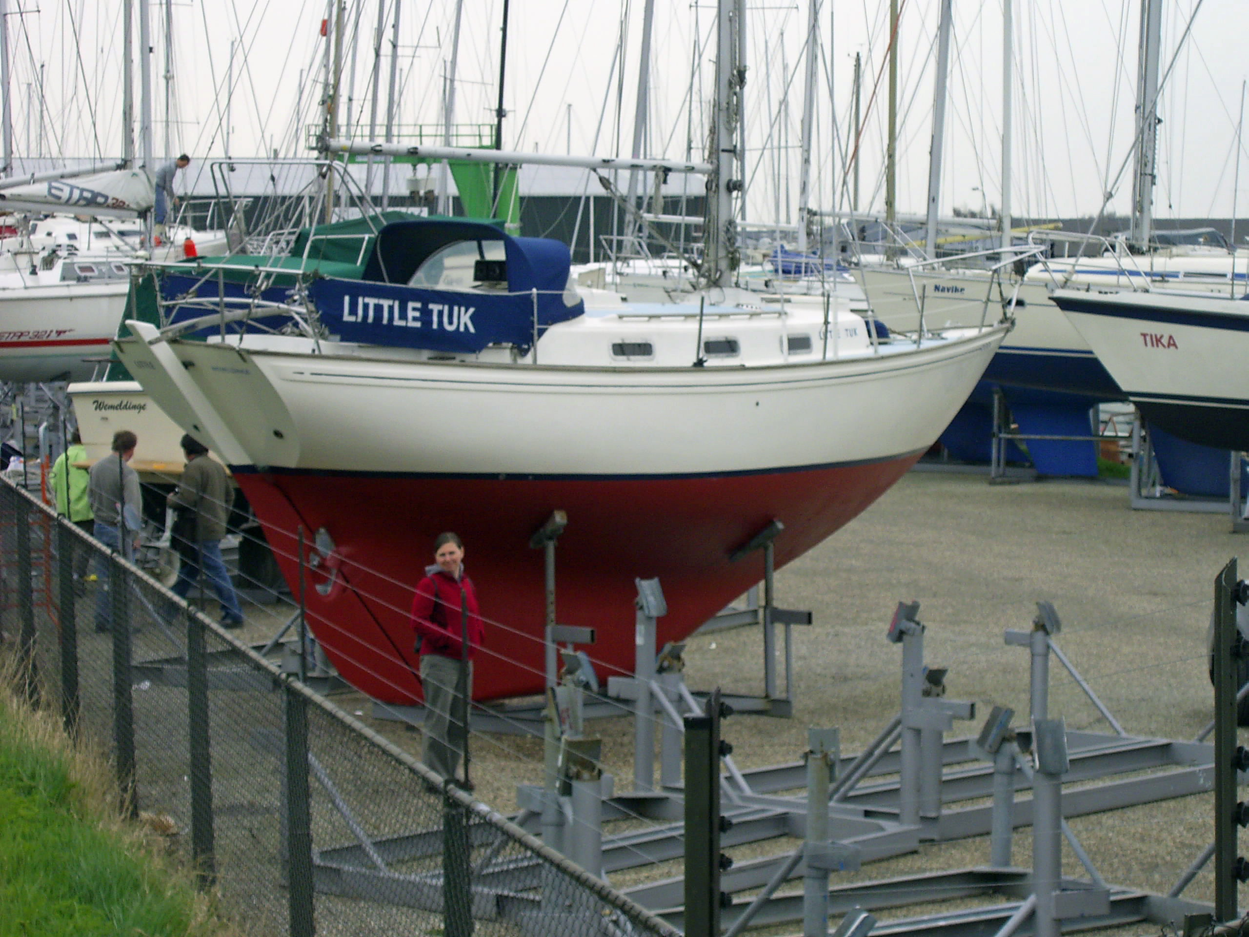 Twister (yacht)